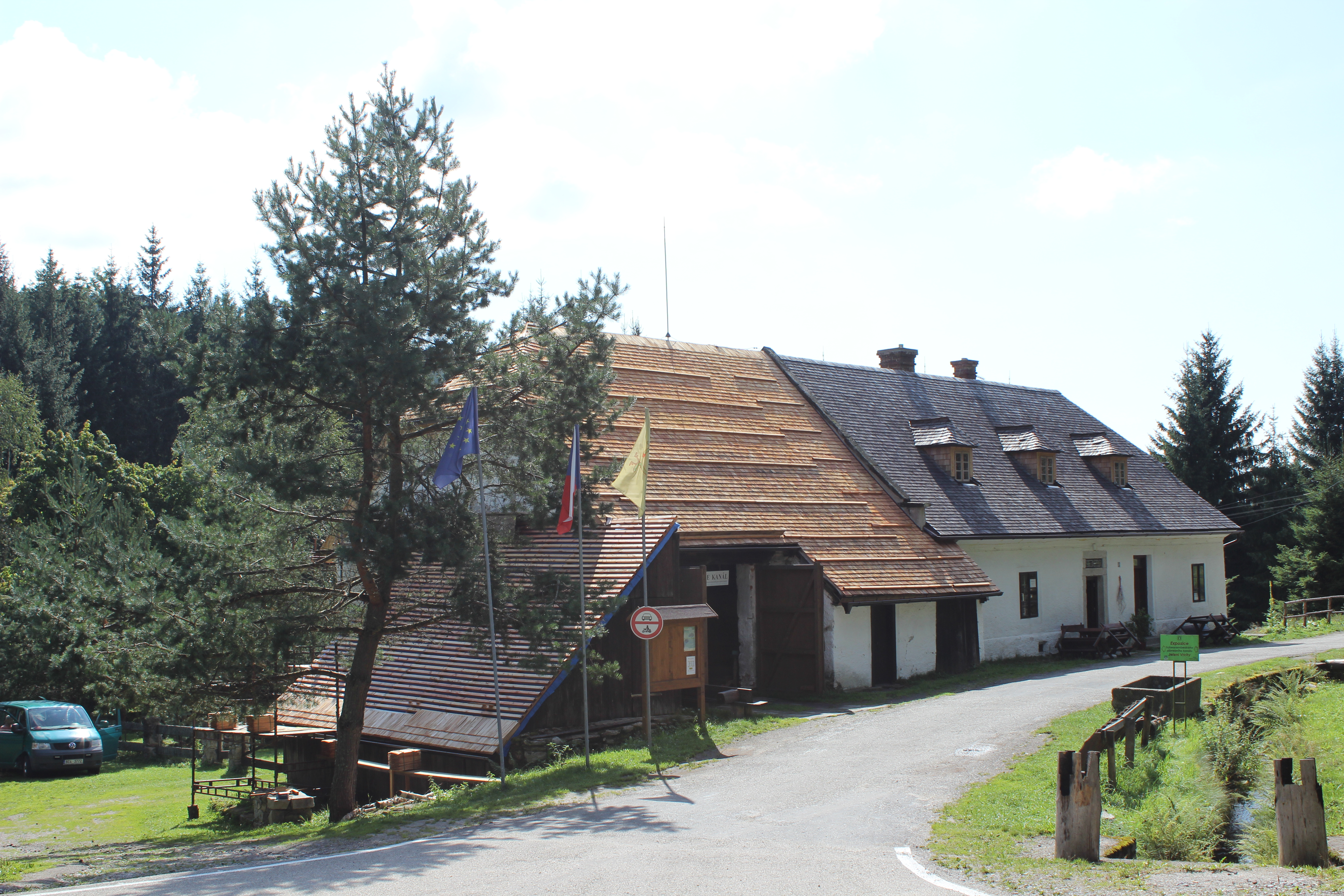 Objekt muzea Schwarzenberského plavebního kanálu v Jeleních Vrších.